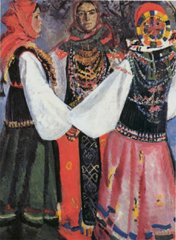 Н. Симонович-Ефимова. Хоровод 1914.